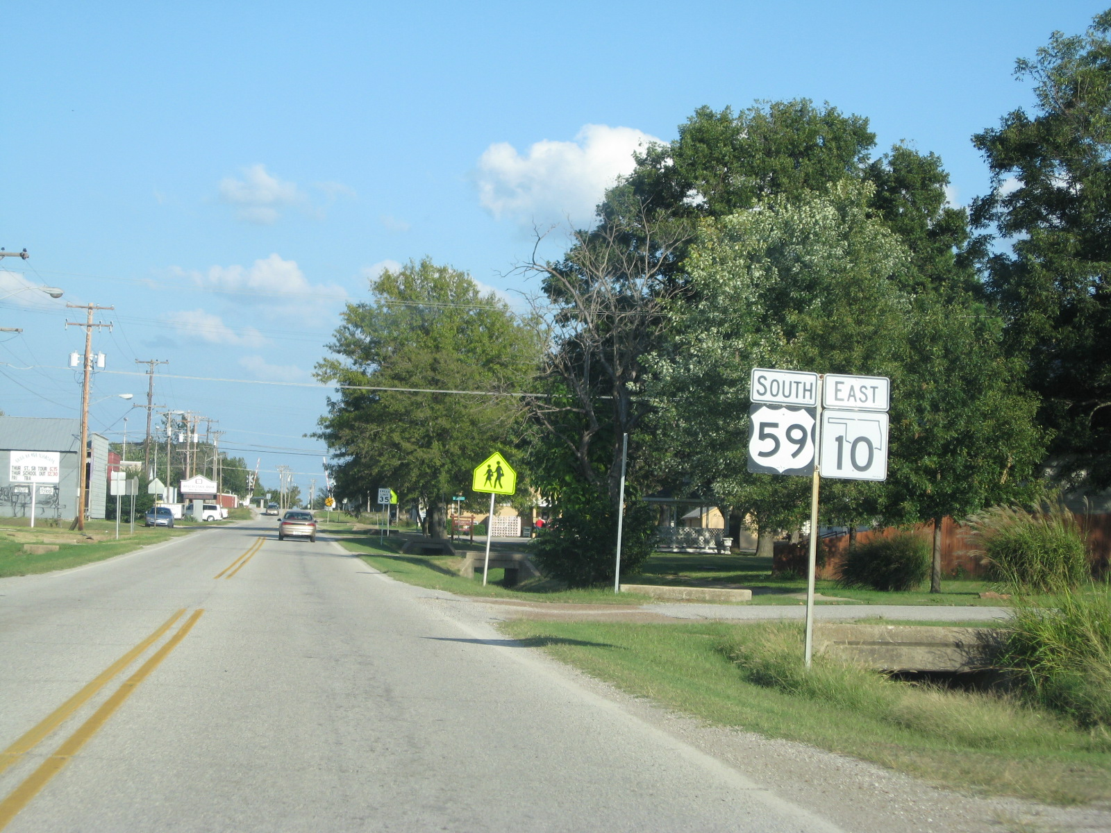 U.S. 59 and OK-10 in Welch, Oklahoma.